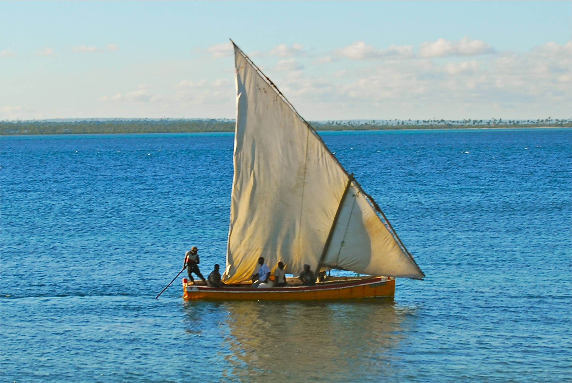 Ilha de Moçambique, Mozambique